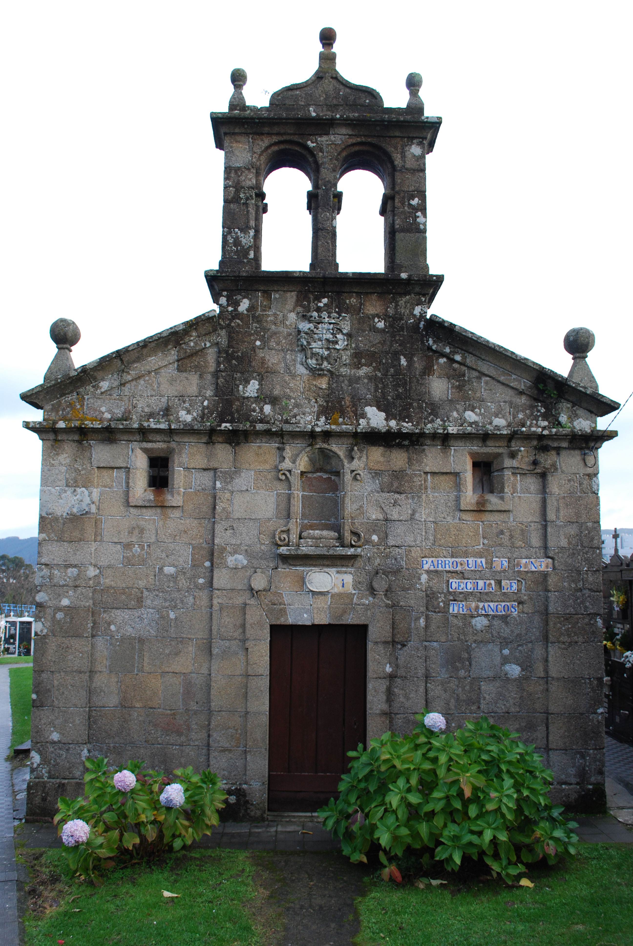 Santa Icía de Trasancos (vista xeral) Ferrol A Coruña Galiza Spain